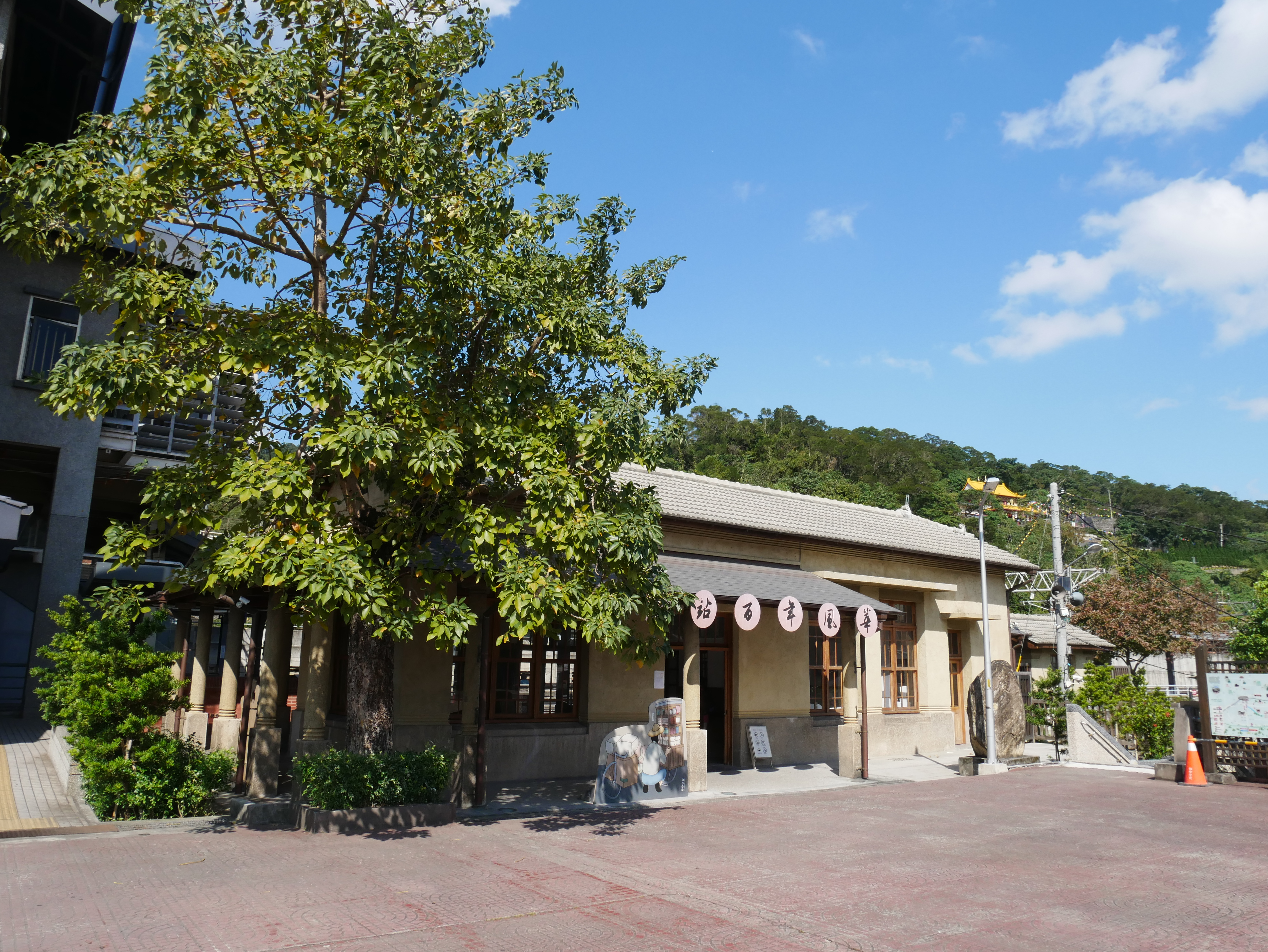 臺鐵山佳車站舊站房，新北市樹林區中山里